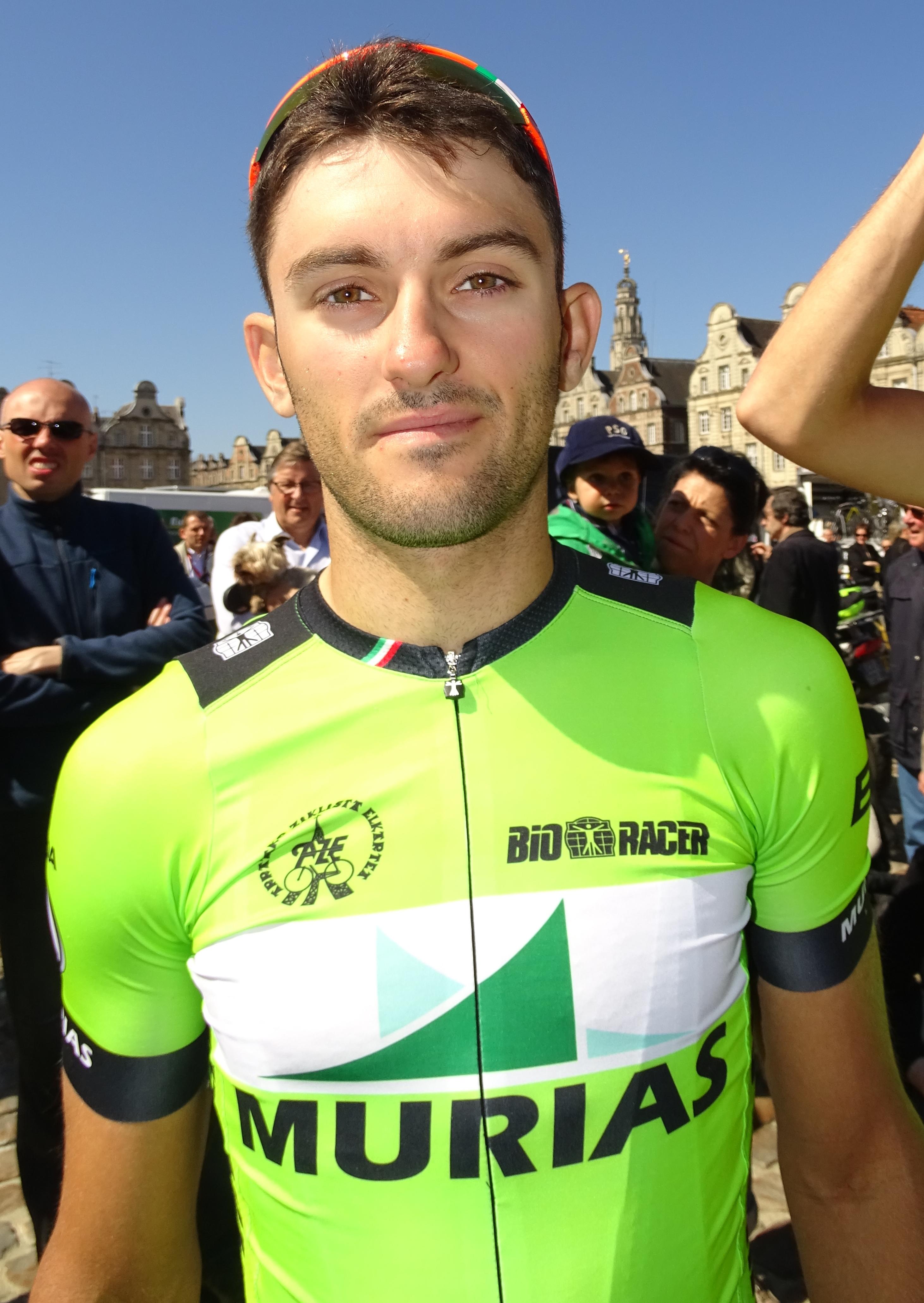 Reportage réalisé le dimanche 24 mai 2015 à l'occasion du départ et de l'arrivée de la troisième étape du Paris-Arras Tour 2015 à Arras, Pas-de-Calais, Nord-Pas-de-Calais, France. Depicted person: Adrian González Velasco Depicted team: Murias Taldea